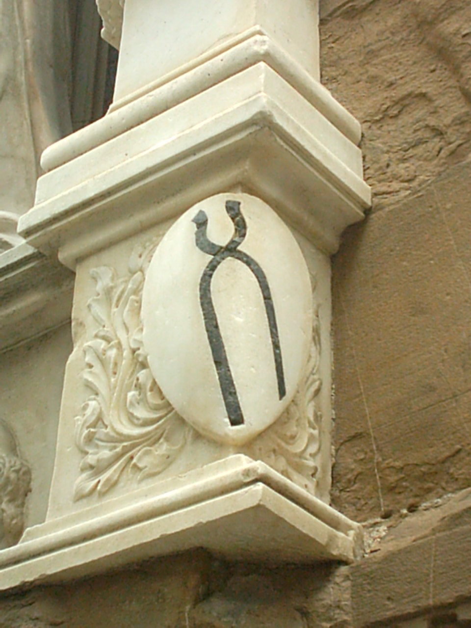 Stemma dell'Arte dei Fabbri sul tabernacolo della chiesa di Orsanmichele a Firenze